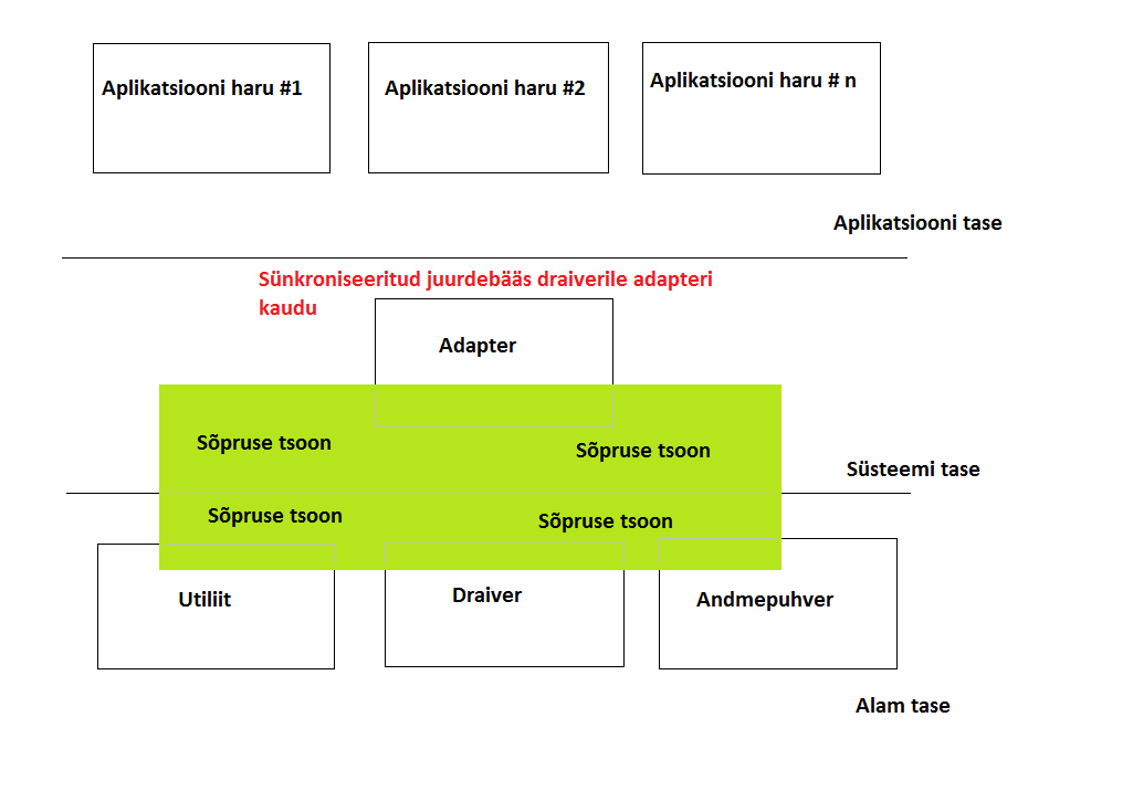 Sõpruse tsoon. Tegin selle ise, sest ei suutnud kopeerida joonist neljandalt lehelt (